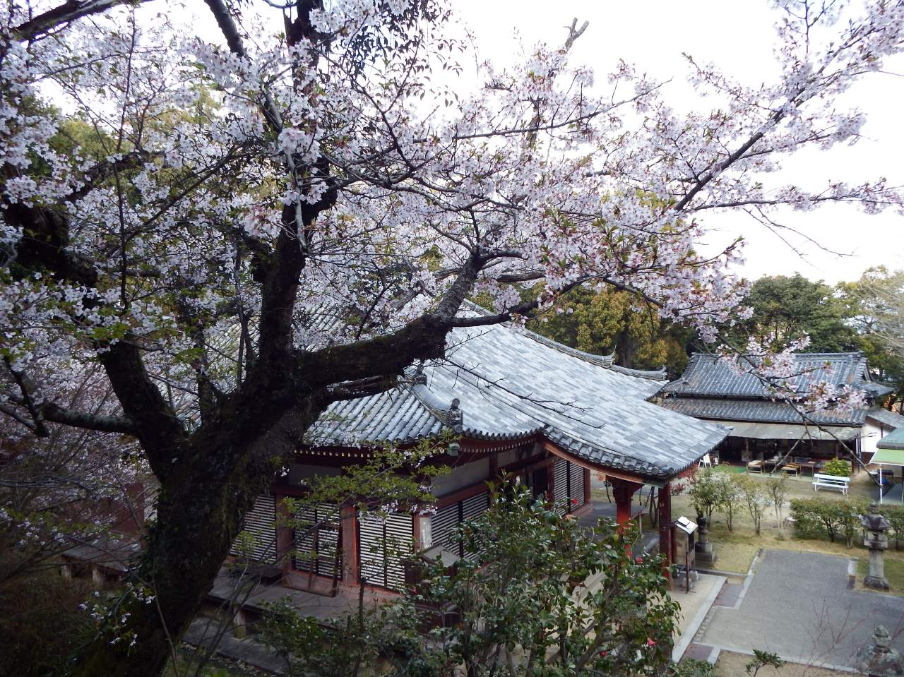 観音寺の本堂の上に桜が咲く